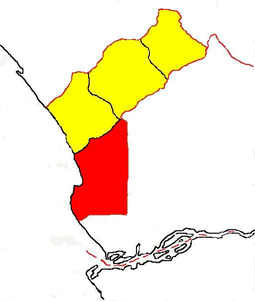 Mappa della municipalità di Cabinda